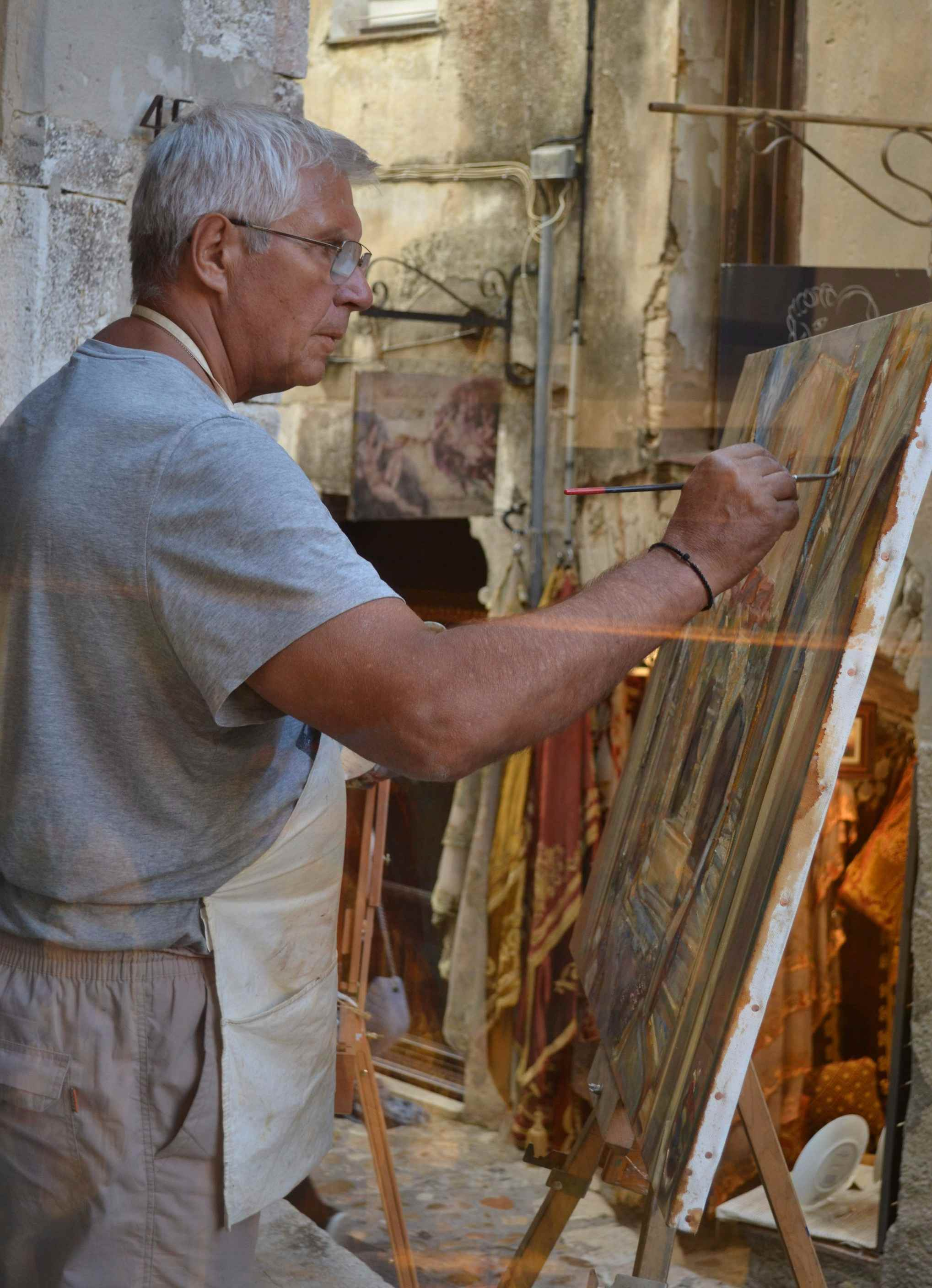 Saint-Paul-de-Vence